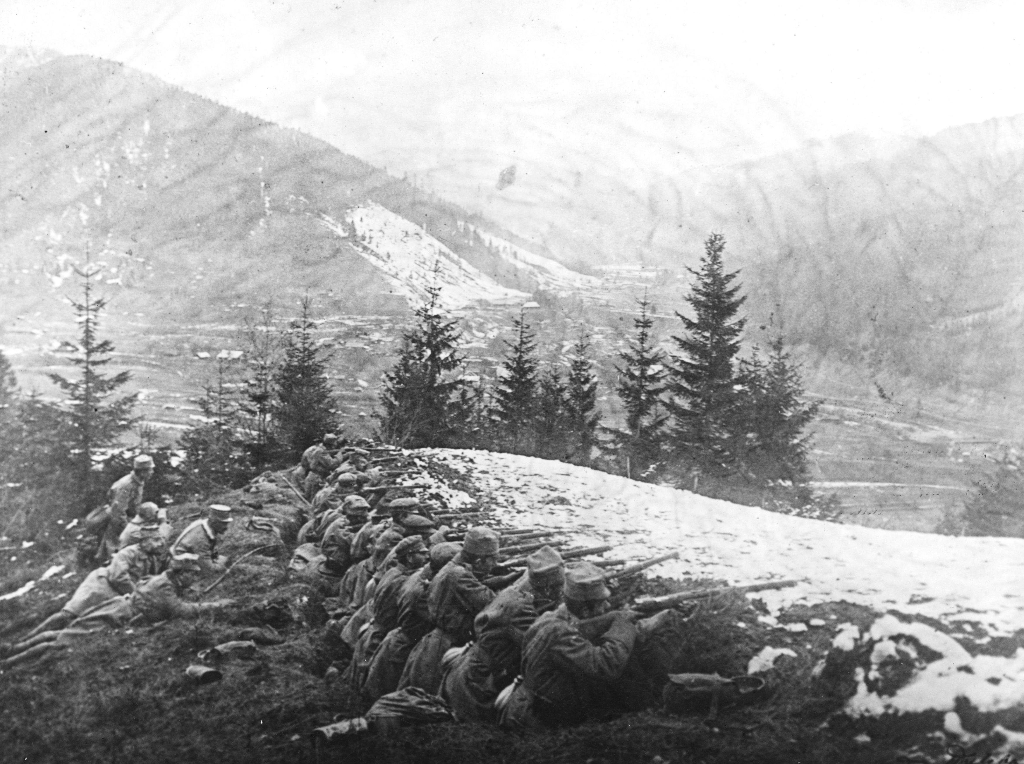 Żołnierze II Brygady Legionów Polskich podczas walk w Karpatach. Pozycje między Rafajłową a Zieloną, listopad 1914 r. (za Legenda Legionów s. 56).